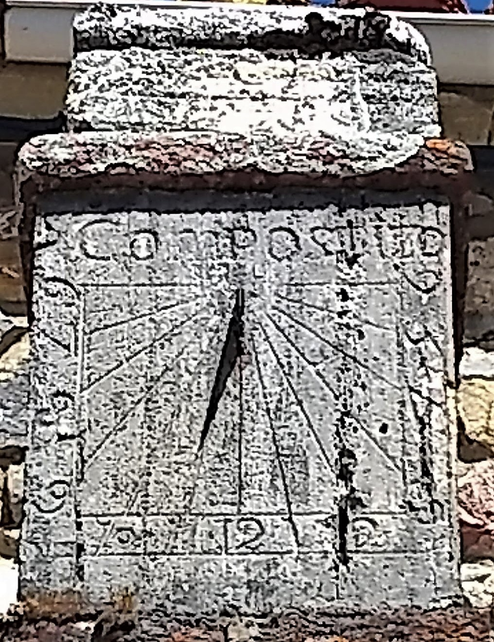 Reloj de Sol Iglesia de Puebla de Lillo